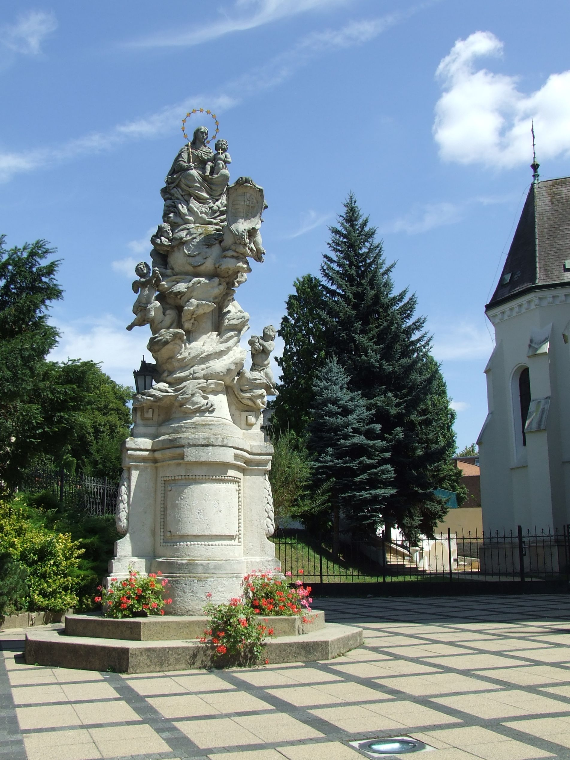 A Toponári rokokó Madonna néven is ismert Mária-oszlop a kaposvári Kossuth téren. Az 1770-ben készült, eredetileg a toponári Festetich-kastély előtt álló alkotást 1974-ben telepítették jelenlegi helyére